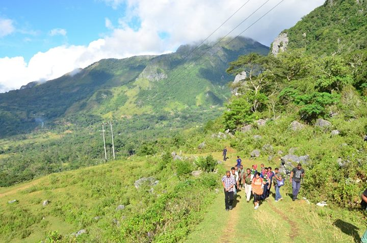 S. E. Primeira-Dama, Isabel da Costa Ferreira no Oan sira, antes atu fila mai Dili, Sei liu husi Knua Kaiwalita, Baguia, hodi Vizita fila fali Aman Mate-bian Sr. Antonio de Vasconcelos nia rate. Mate-Bian husik hela nia Oan, Subriño, Subriña, no Beioan sira iha Loron, 19 Juñu 1997